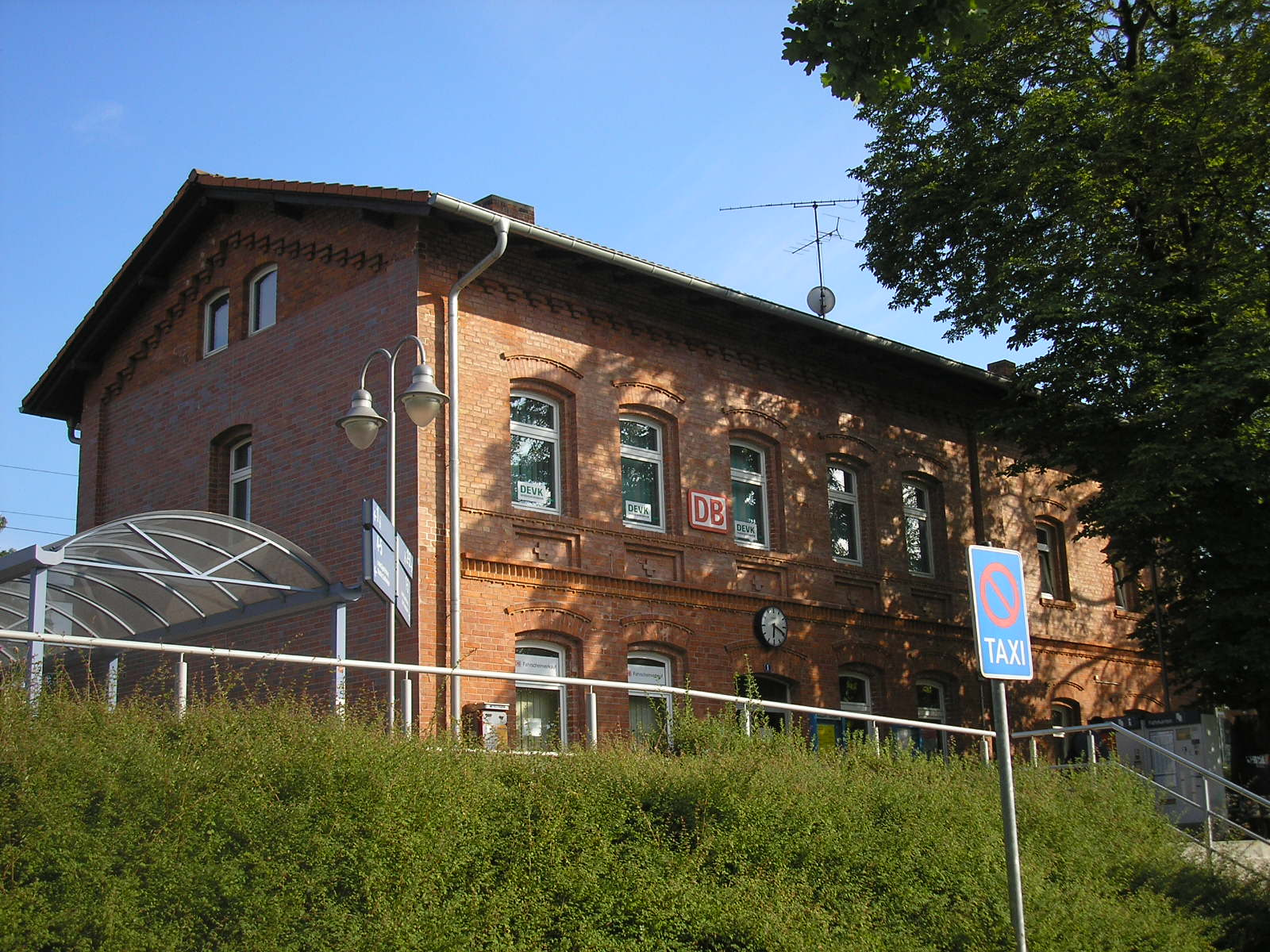 Das Bahnhofsgebäude von Sömmerda (Thüringen).